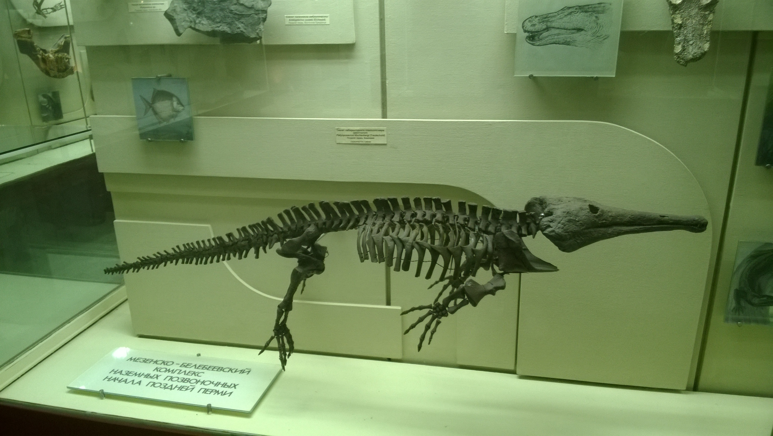 Представитель пермской фауны. Палеонтологический музей. Москва. Июнь 2014